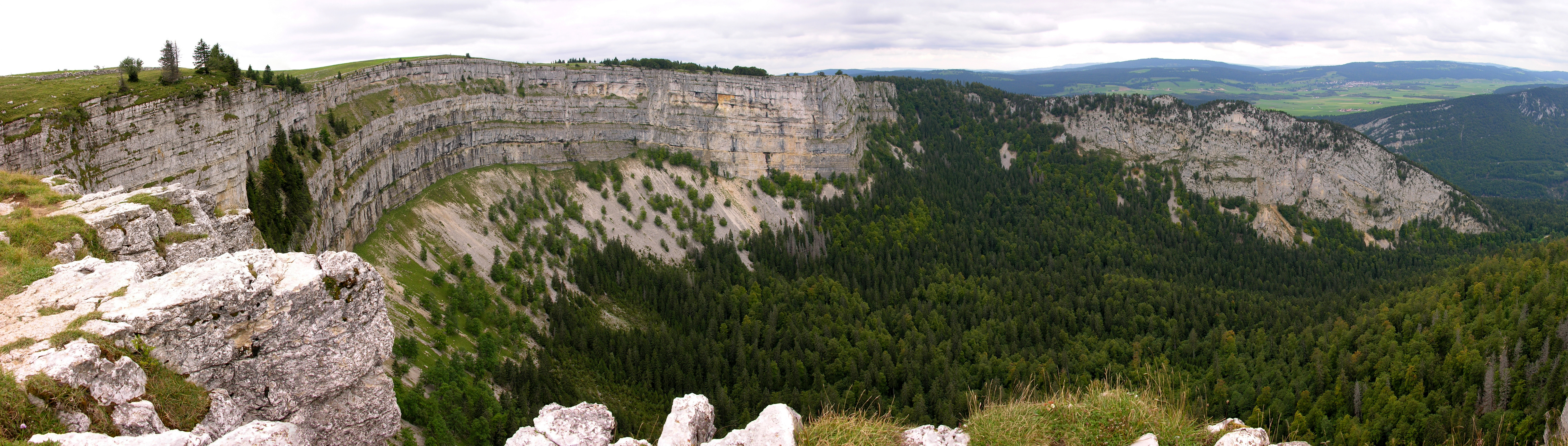 Switzerland, Neuchâtel, Creux du Van